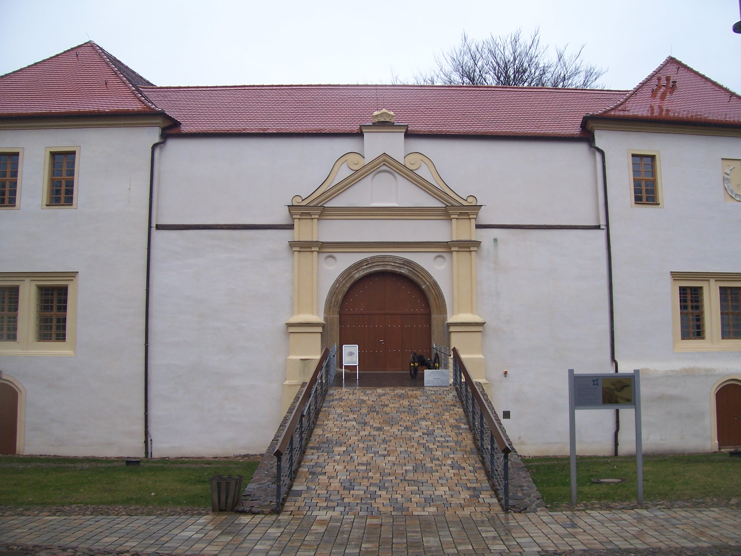 Eingangsportal des Senftenberger Schlosses.